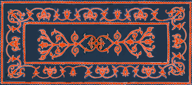 Kafkasyada üretilmiş Avar keçe örneği çizimi. İllüstrasyon.Erol YILDIR